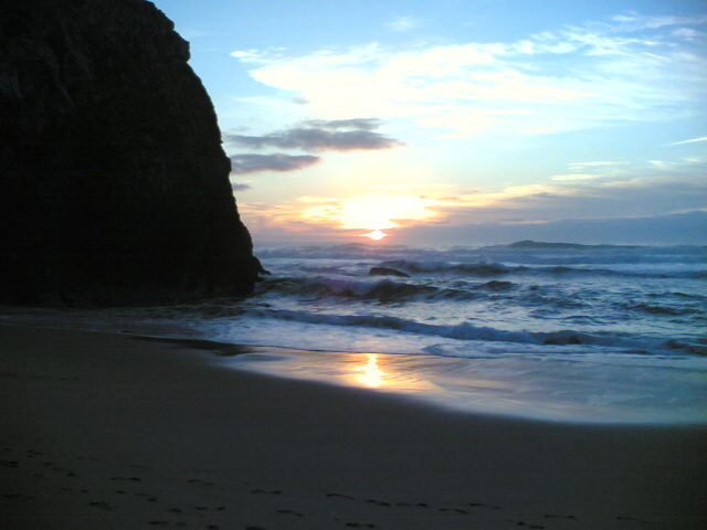 Praia da adraga, Sintra, Portugal